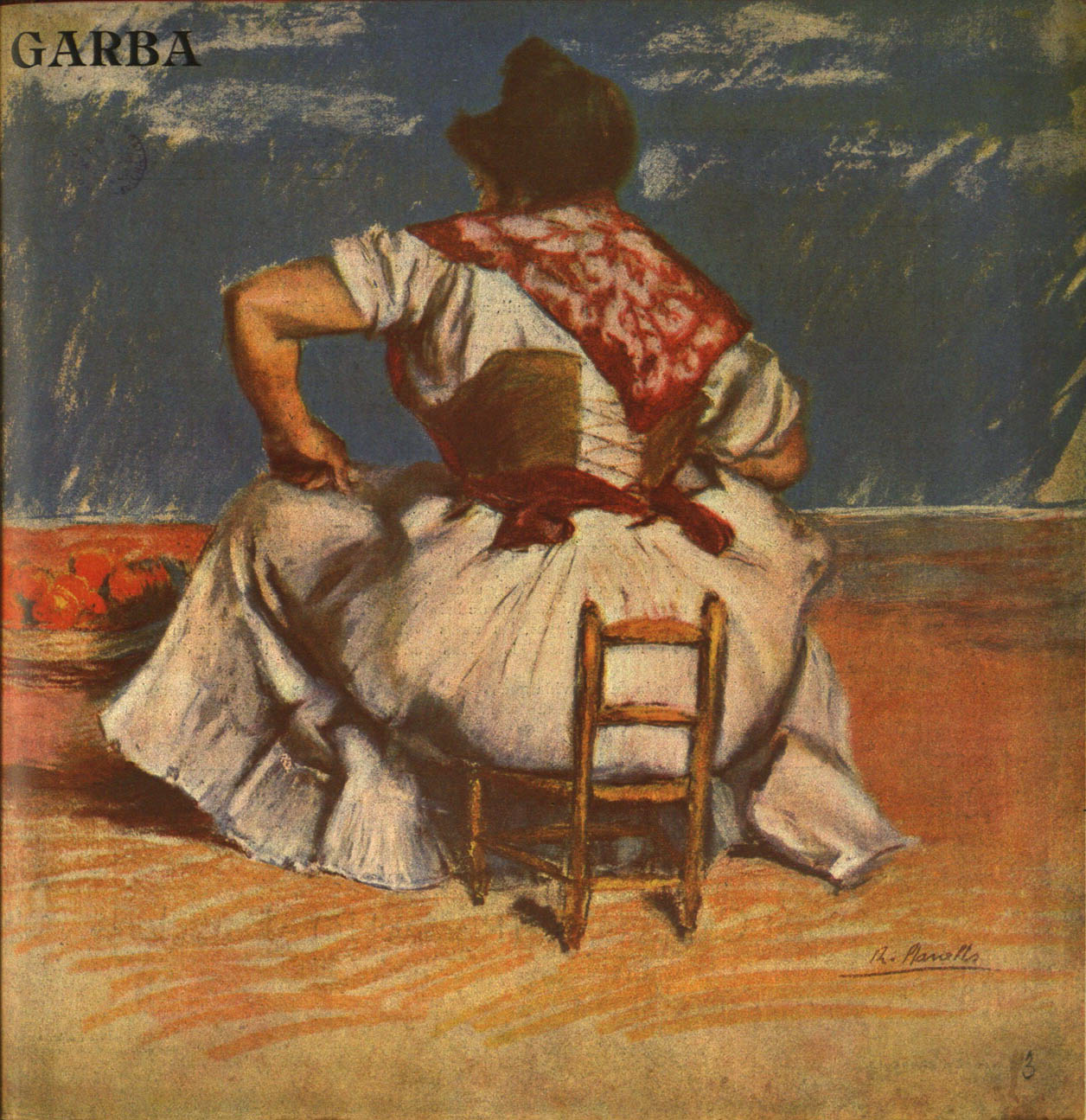 Garba (revista)